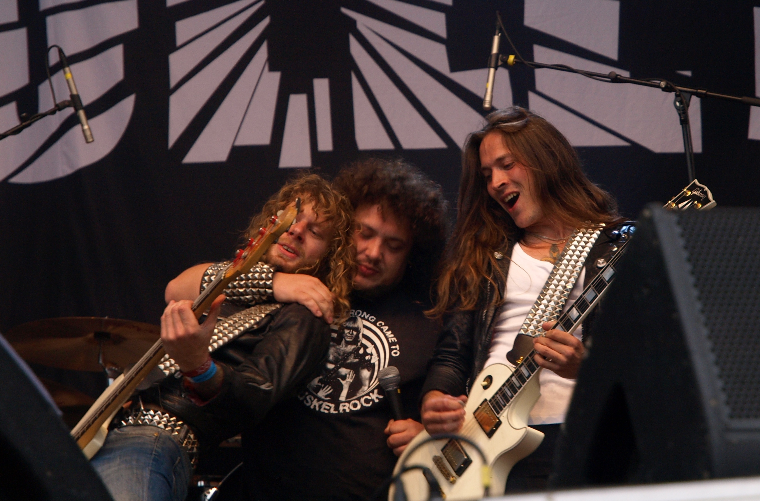 Bullet live am Myötätuulirock 2011